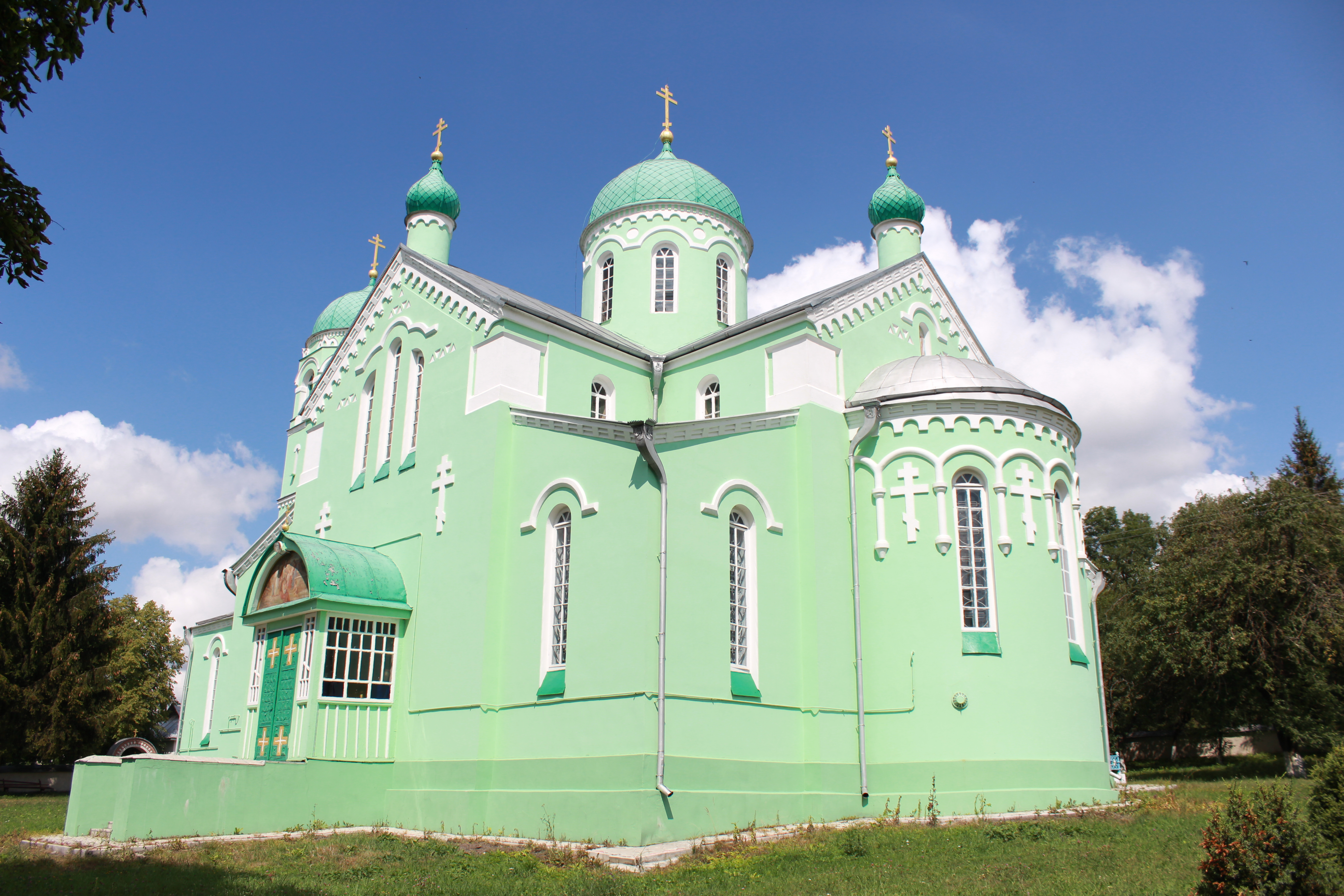 Церква Св. Михаїла (мур.), село Білозірка